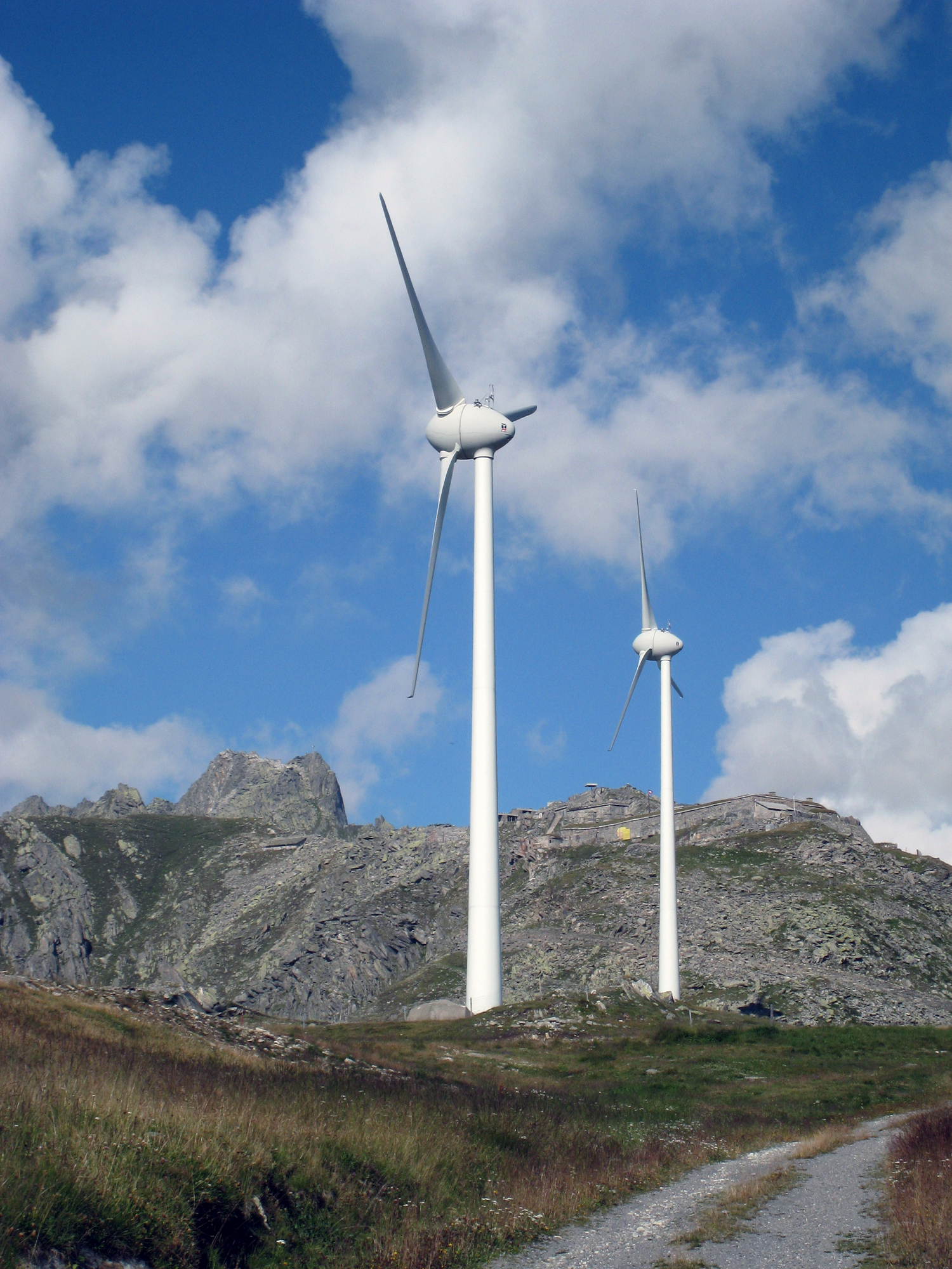 ehemalige Festung Gütsch ob Andermatt